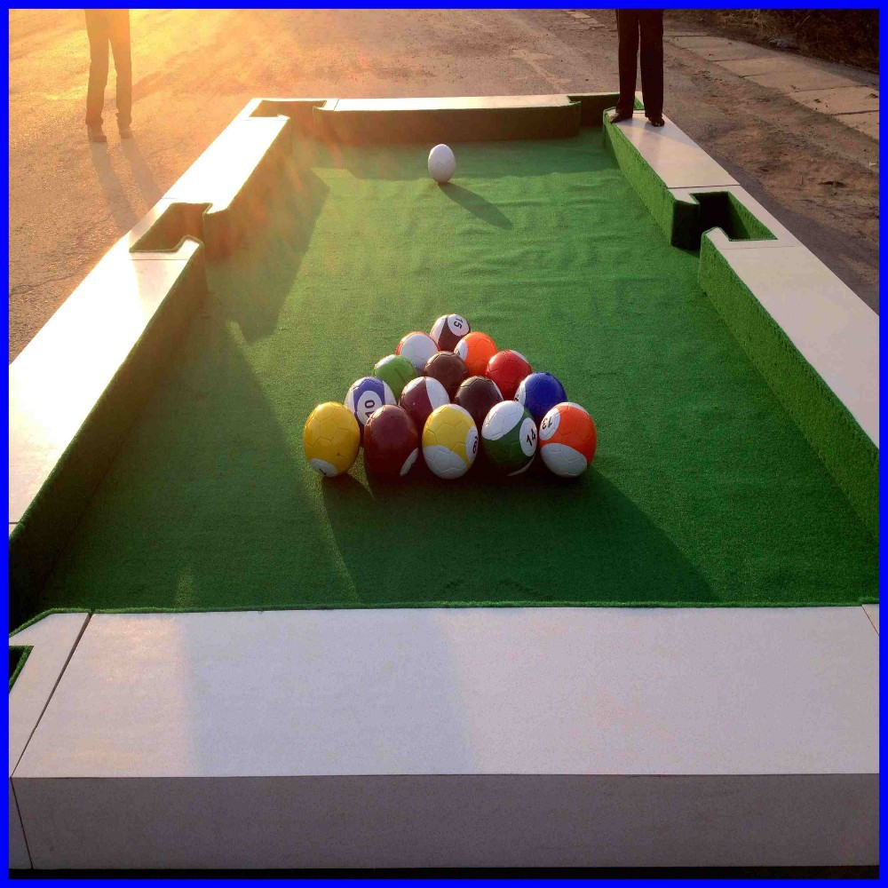 El deporte de billar llamado snookball